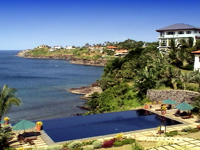 Double-Infinity Pool, Peninsula de Punta Fuego